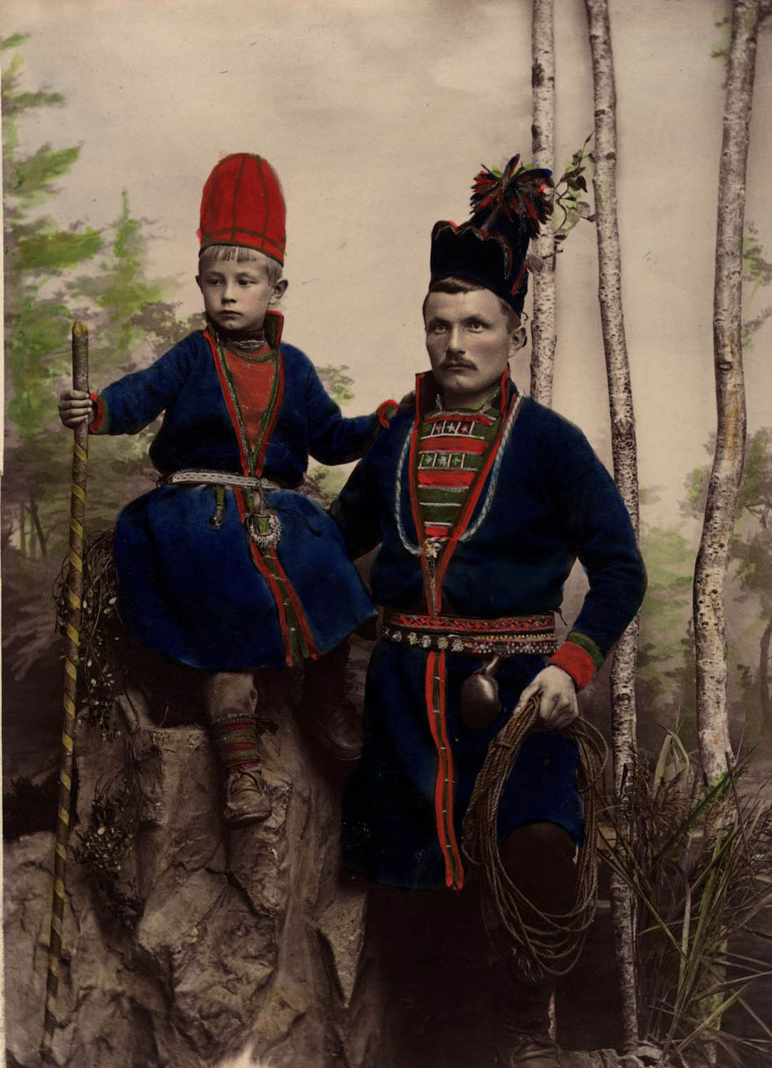 Samisk man med son. Nejla och Mattias Årén, Frostviken Lappland.Studiofotografi, handkolorerat.